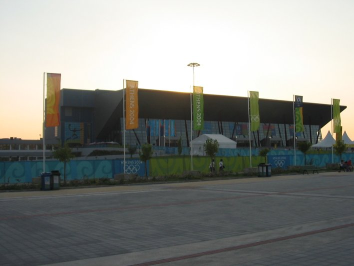 Helliniko Olympic Complex Indoor ArenaSalle des sports du Complexe Olympique d'Helliniko